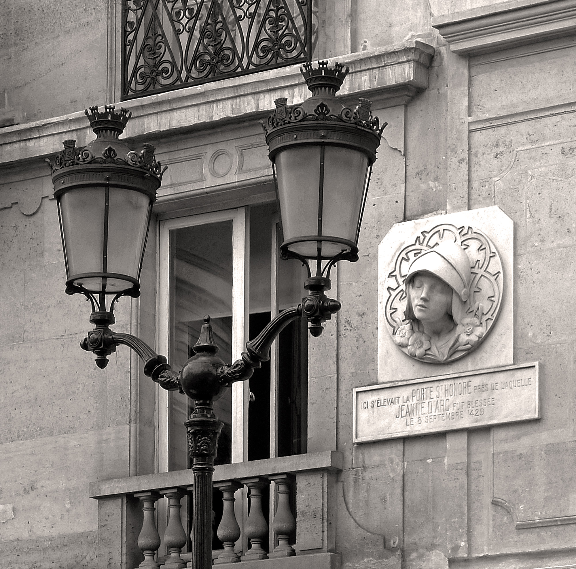 Rue Saint-Honoré (n°161-163 : bas-relief commémoratif de Jeanne d'Arc, à proximité de l'ancienne porte Saint-Honoré de l'enceinte de Charles V) et candélabre d'éclairage public muni de deux lanternes posées à base ronde - Paris Ier arrondissement, France.